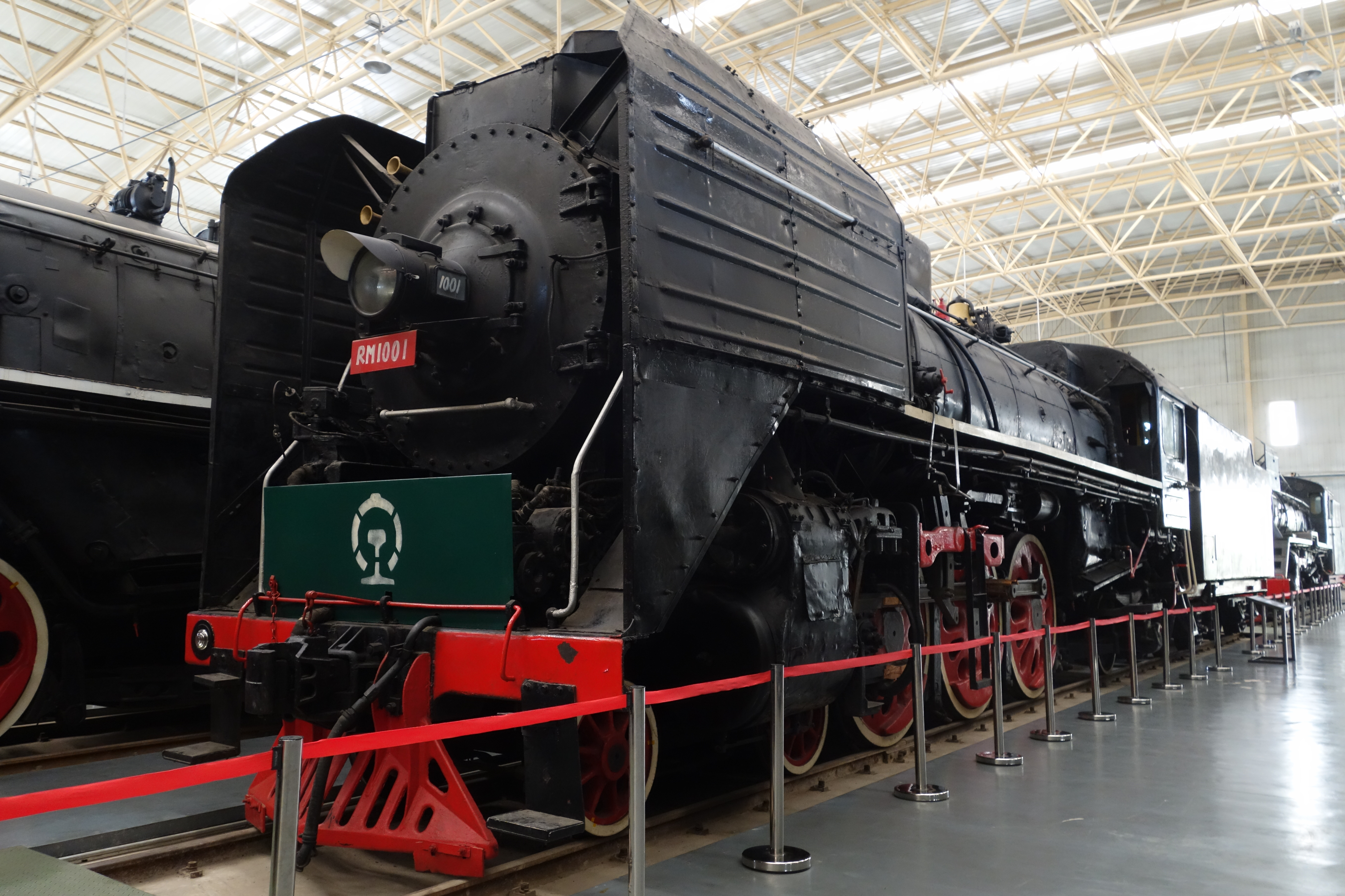 中国铁路人民-1001蒸汽机车